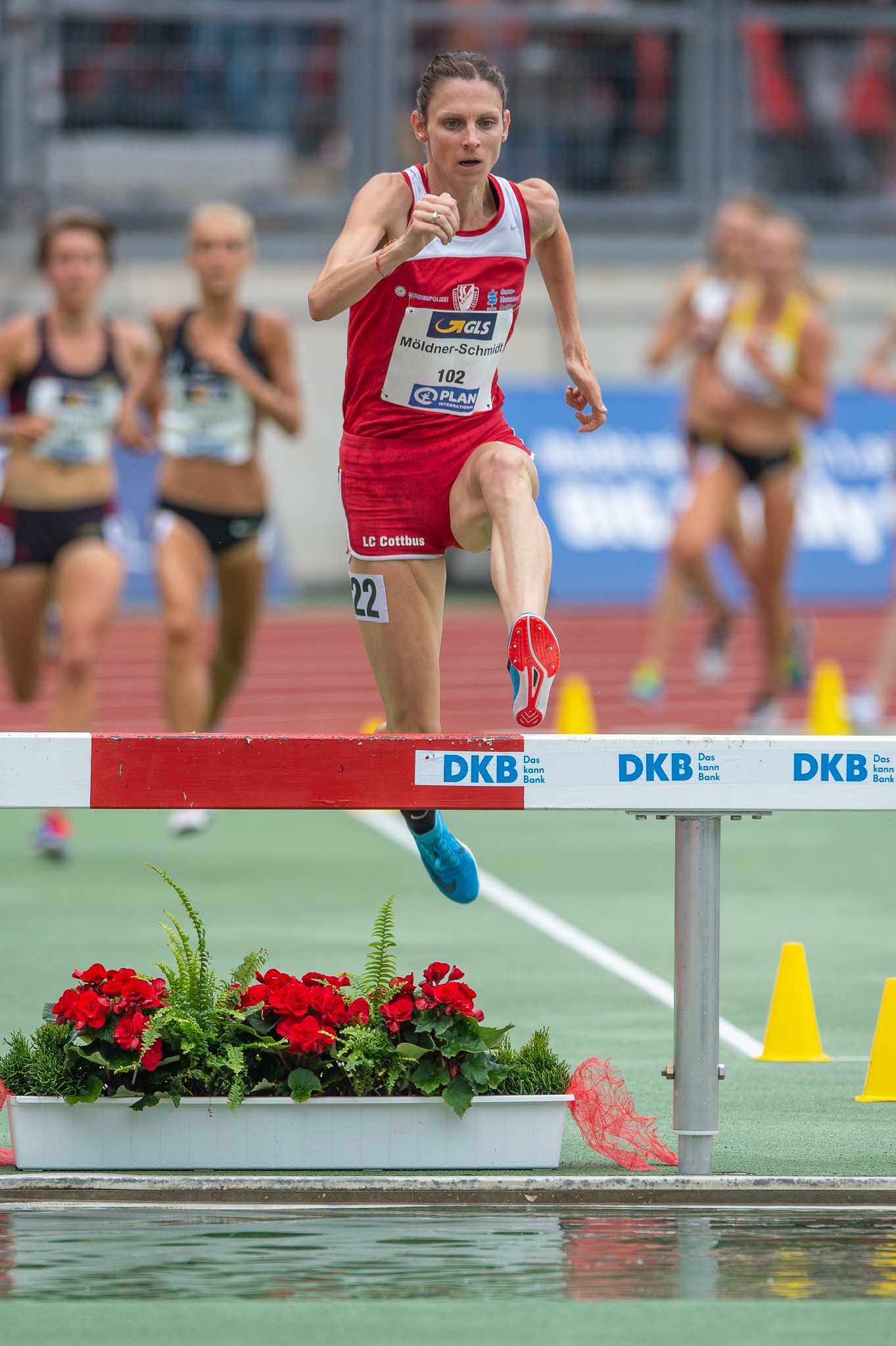 3000 Meter Hindernislauf,Antje Möldner-Schmidt,DLV,Deutsche Leichtathletik Meisterschaften 2018,Deutscher Leichtathletik-Verband,LC Cottbus,Max-Morlock-Stadion,Steeplechase